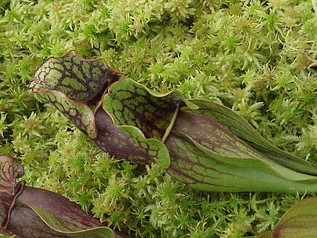 Species: Sarracenia purpurea Family: Sarraceniaceae Image No. 1